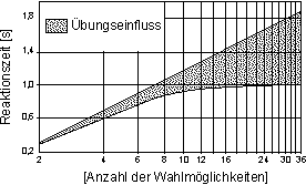 Reaktionszeiten in der Verkehrspsychologie (siehe auch Hicksches Gesetz)